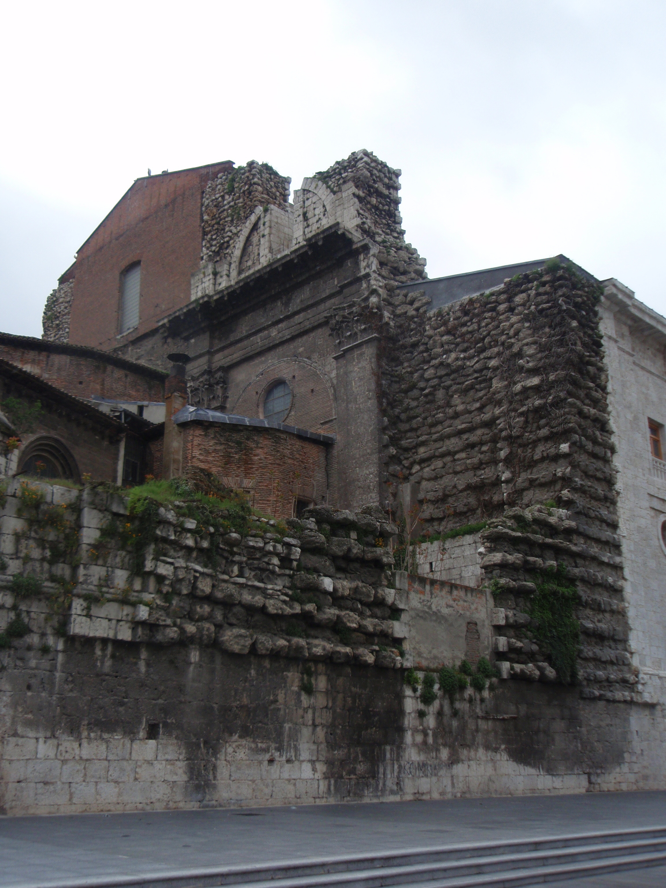 Valladolid (España). Catedral. Vista de la fachada oeste (sin concluir) y del crucero inacabado, mostrando parte de su alzado interior. Se aprecian también los ábsides provisionales del siglo XVII y el cerramiento de la nave de ladrillo del mismo momento.